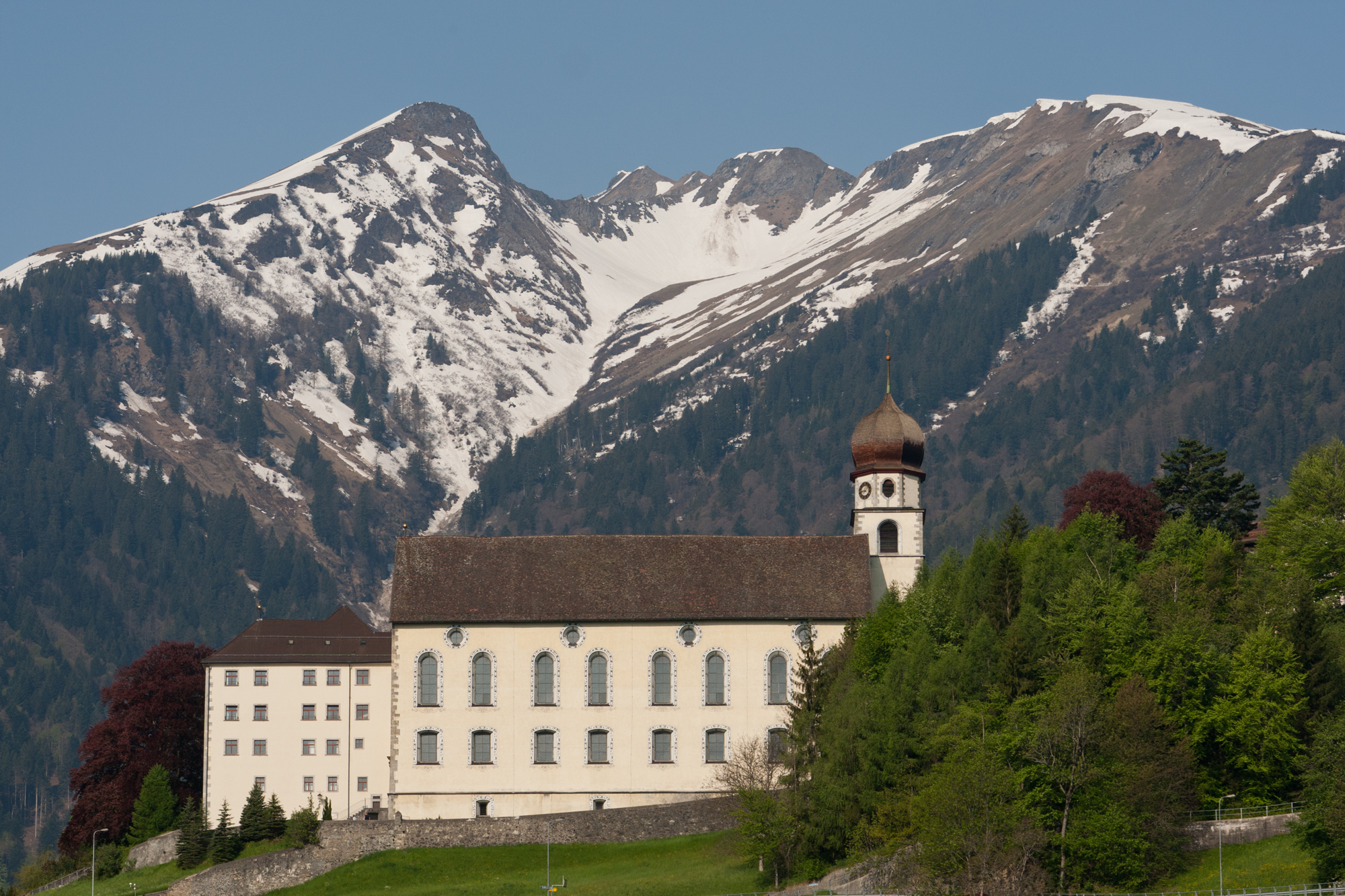 Ehemalige Benediktinerabtei in Pfäfers